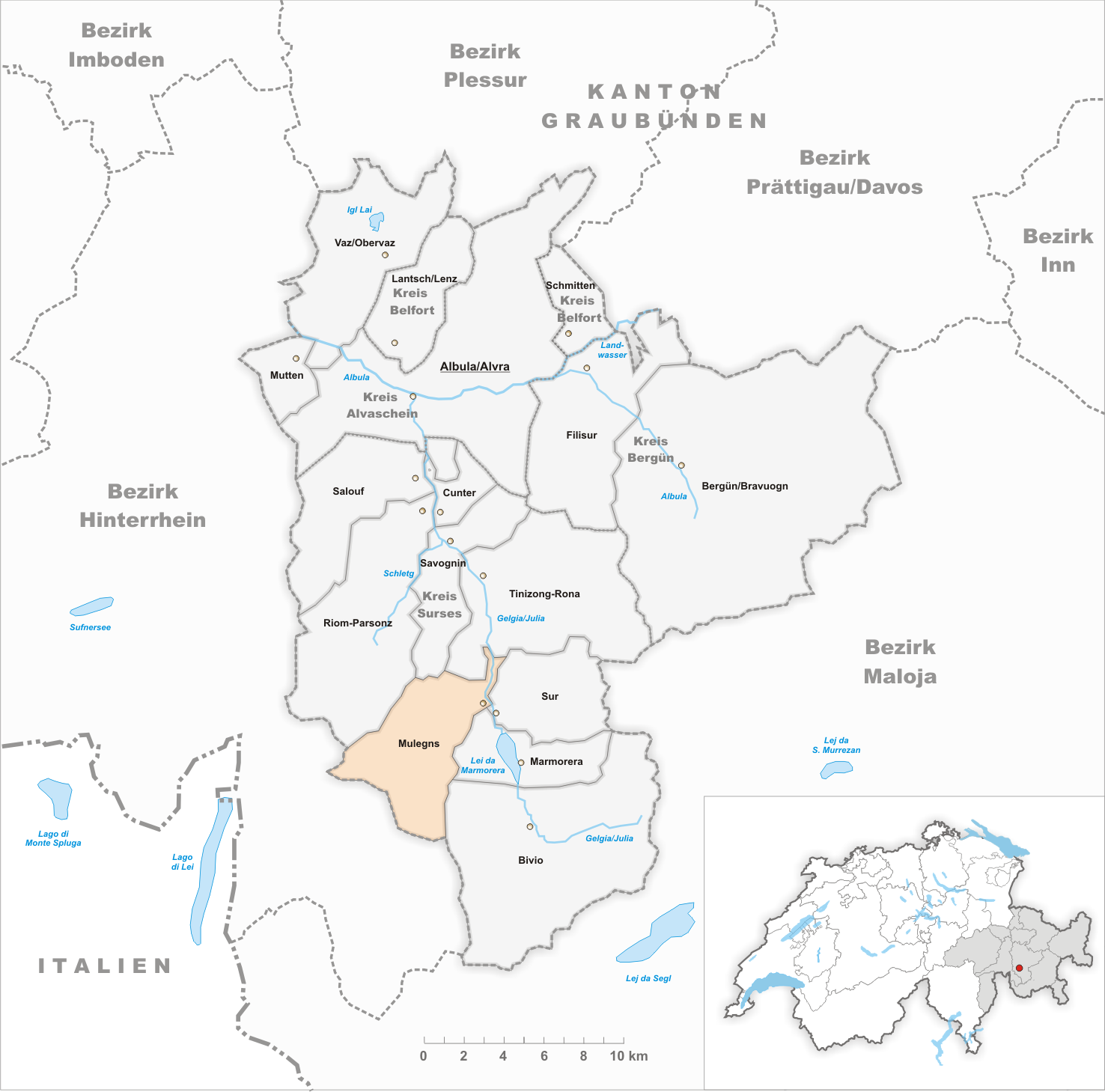 Municipality Mulegns